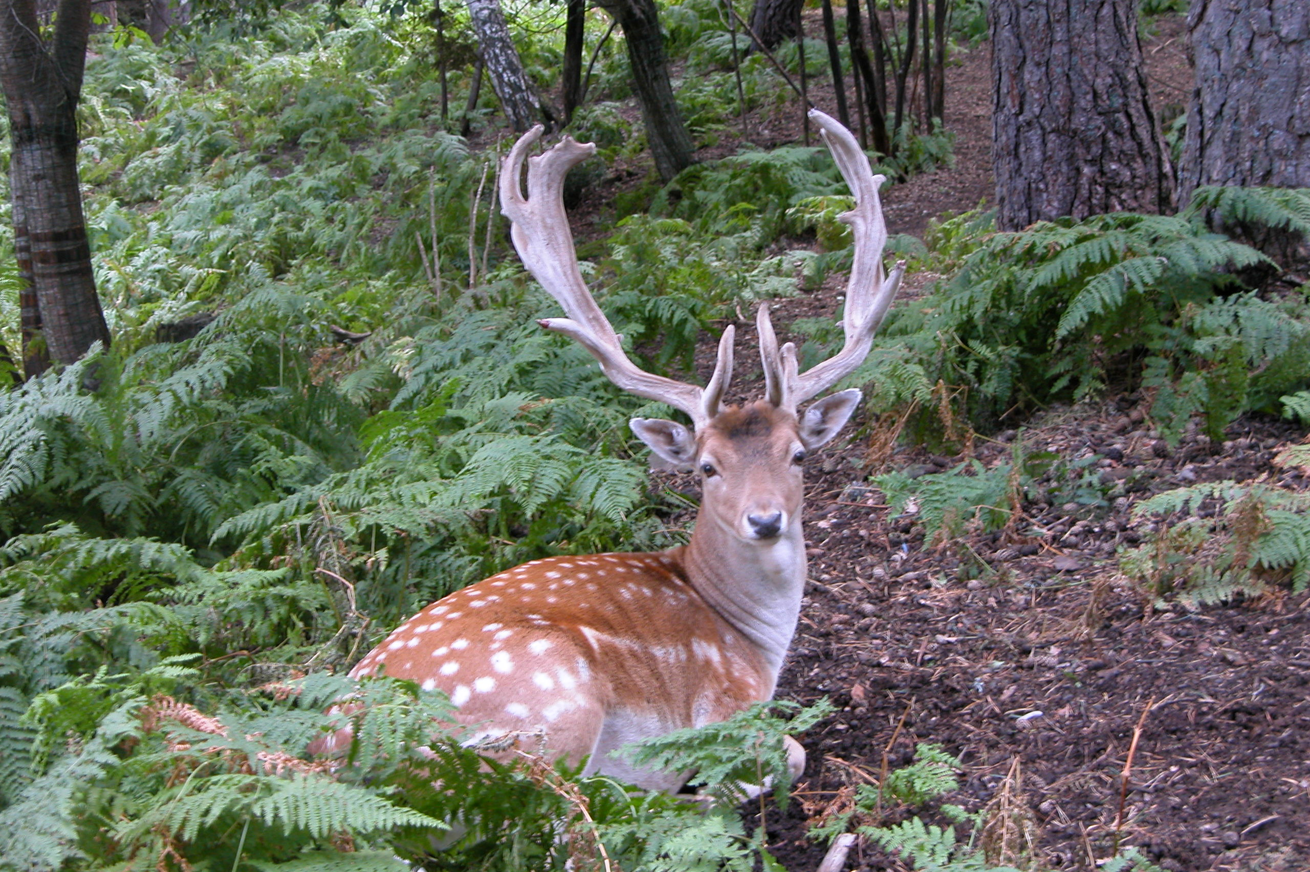 Dama dama Daina